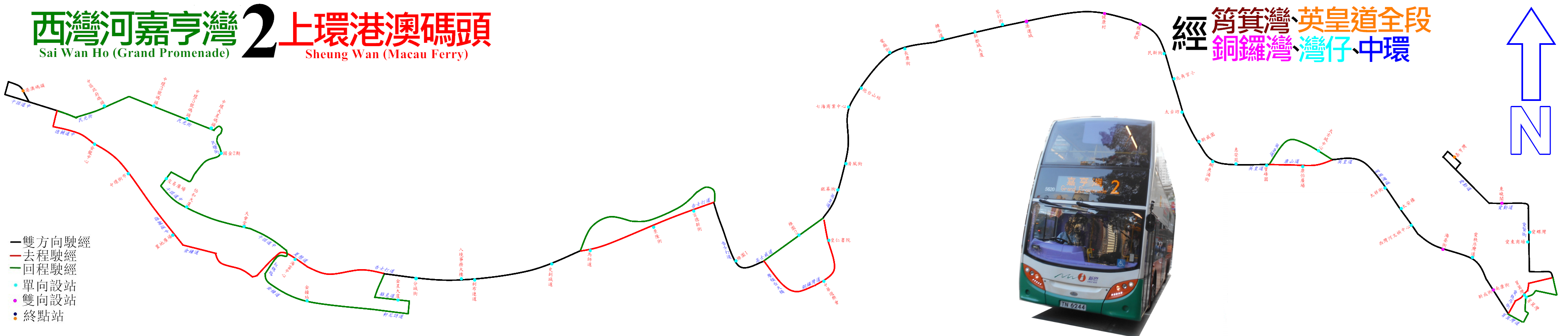 中文（香港）: 新巴2號線的走線圖